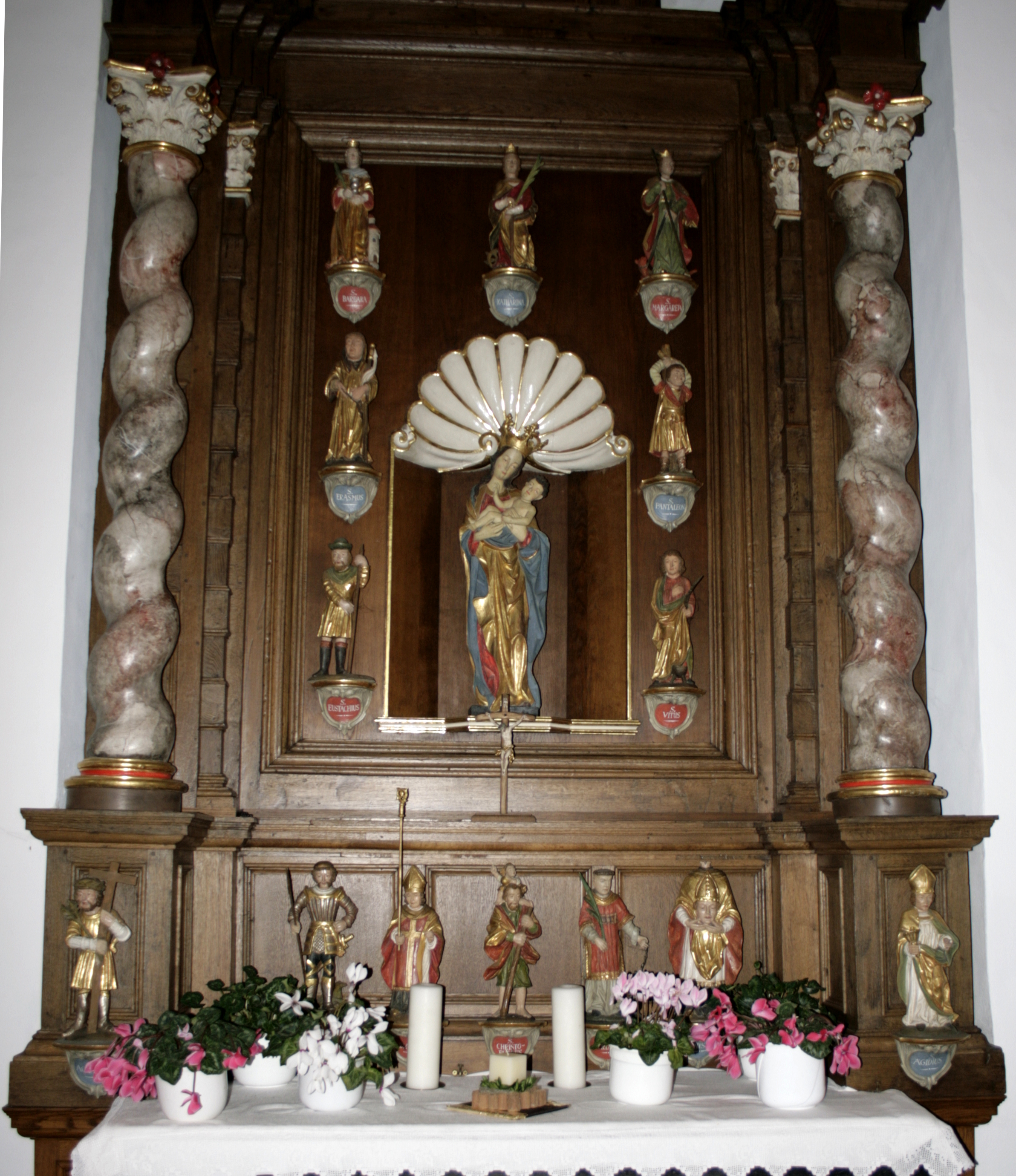 Nothelferaltar in Hadamar-Steinbach, Deutschland